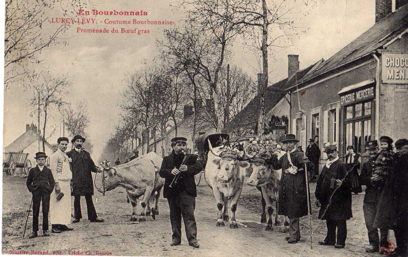 La promenade du Boeuf Gras à Lurcy-Lévis